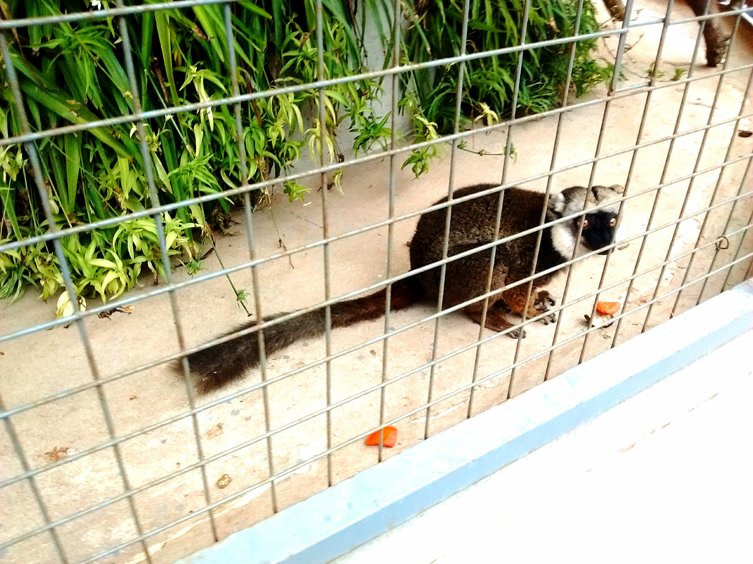 Lemur cautivo en el zoológico de Córdoba